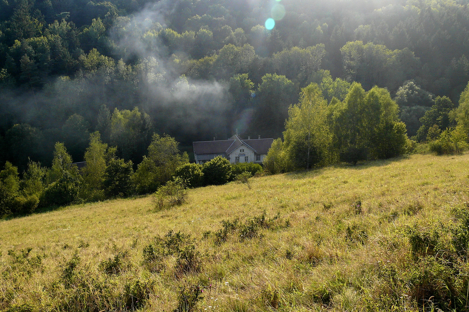 Železniční stanice Skalsko, stráň PP Zadní Hrádek.